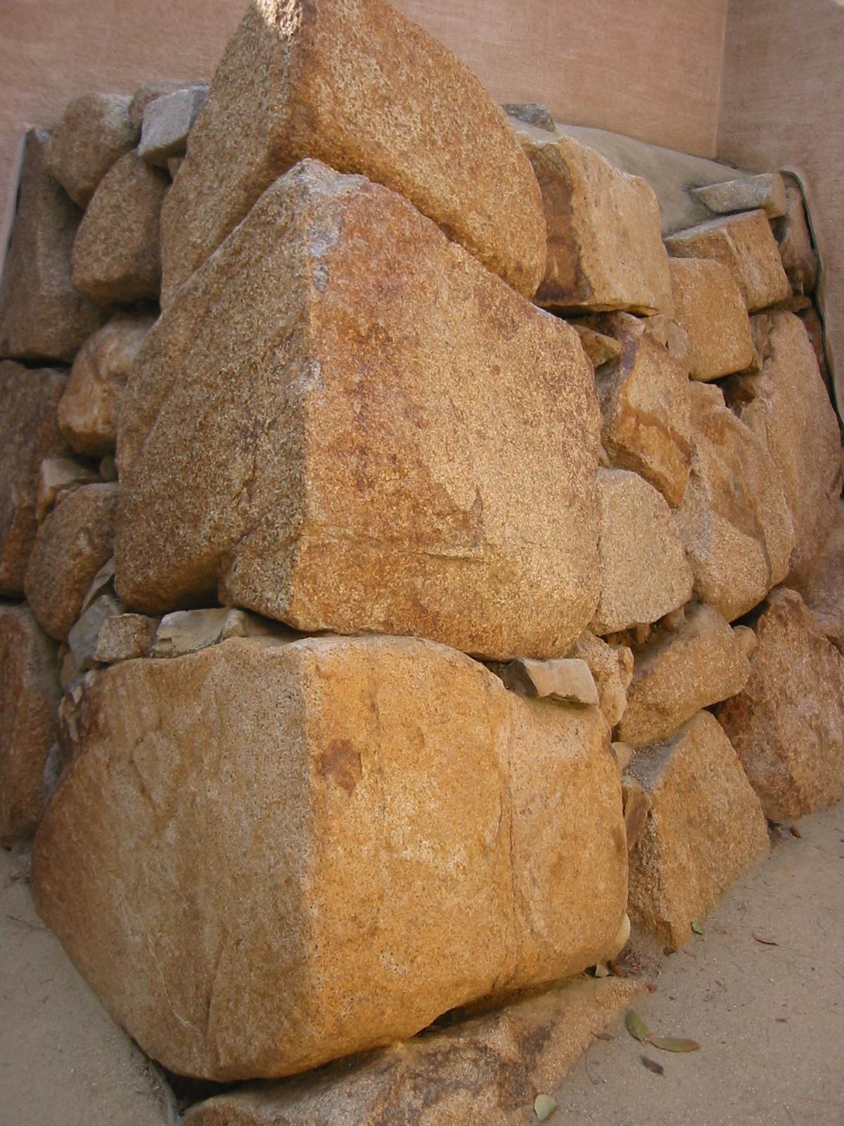 岡山城平成5年の発掘調査で発見された江戸時代初めの改造前、築城時の石垣